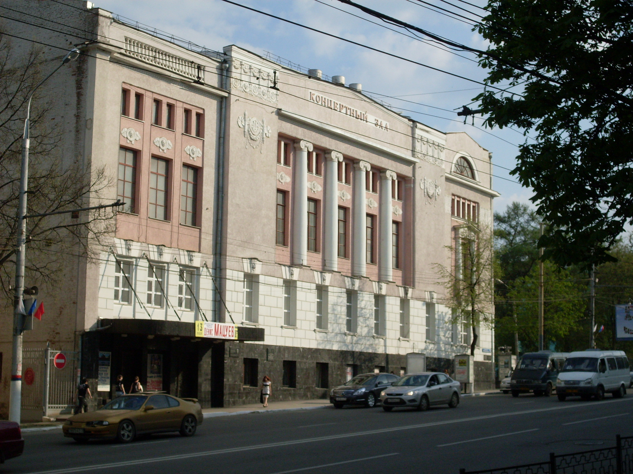 ТулОблФ